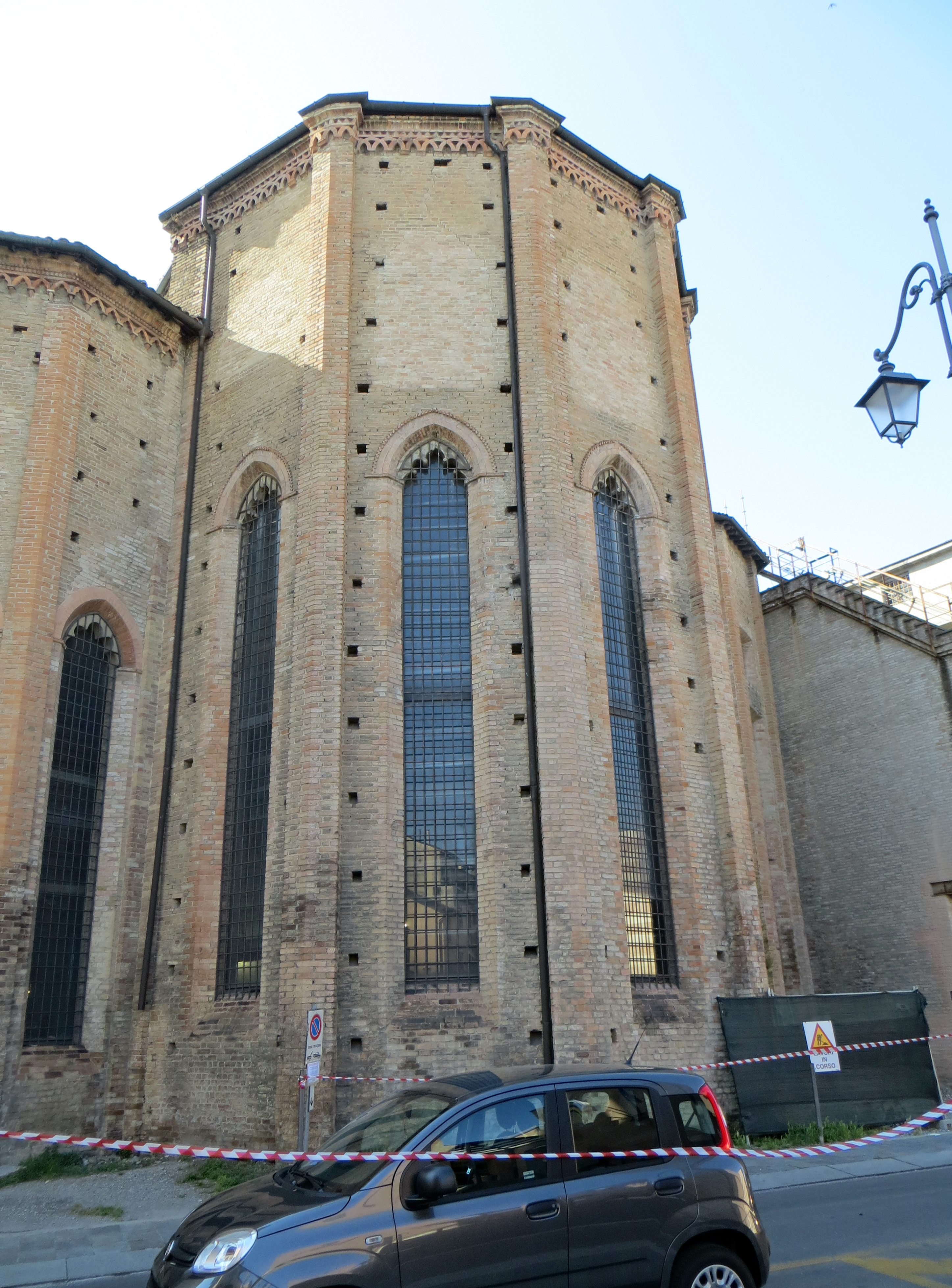 Chiesa di San Francesco del Prato (Parma) - abside